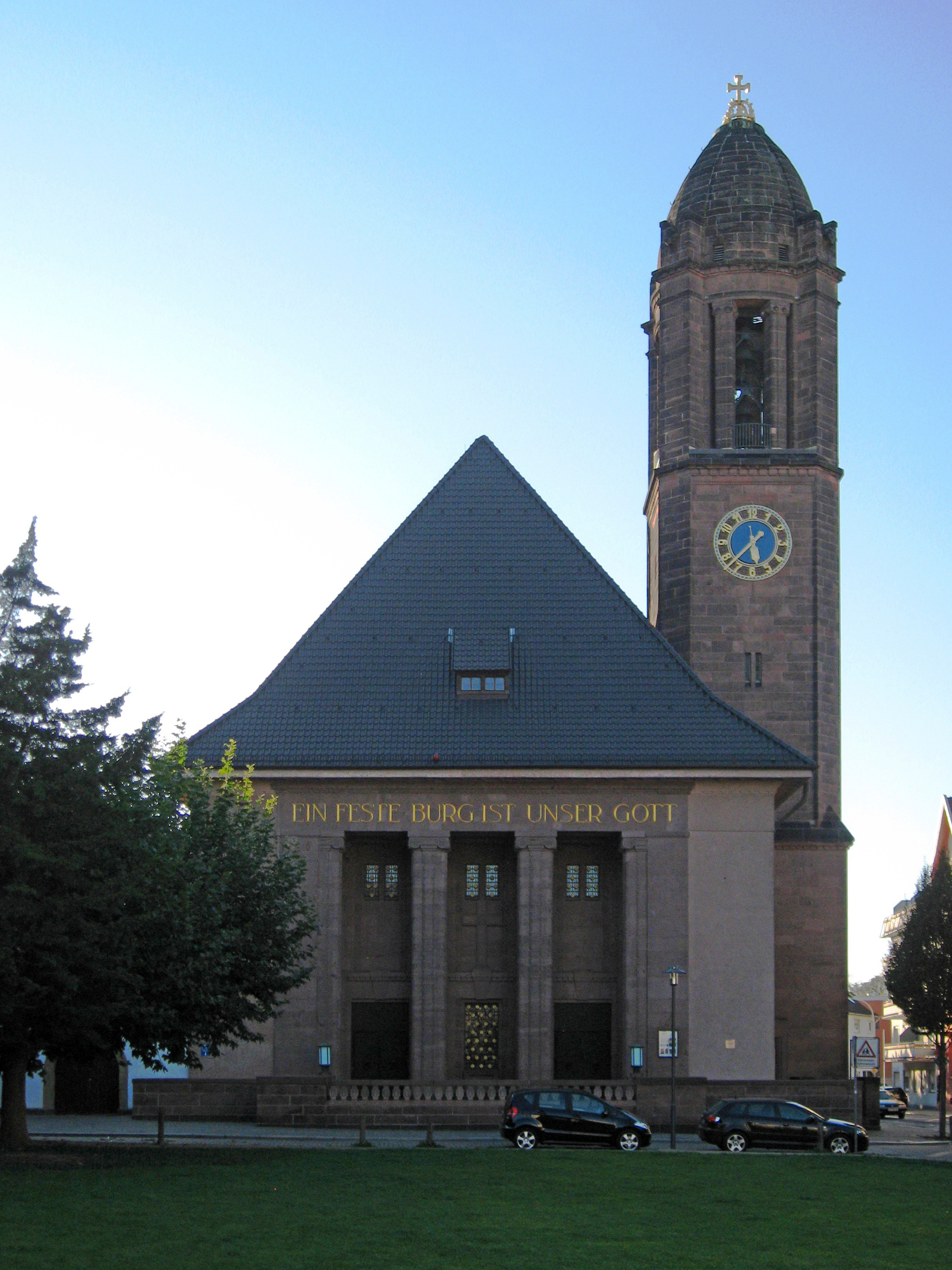 Worms, Lutherkirche von Osten